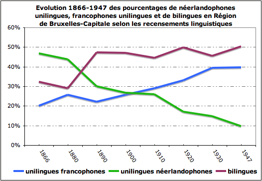 Résultats des recensements linguistiques par commune de la Région Bruxelles Capitale